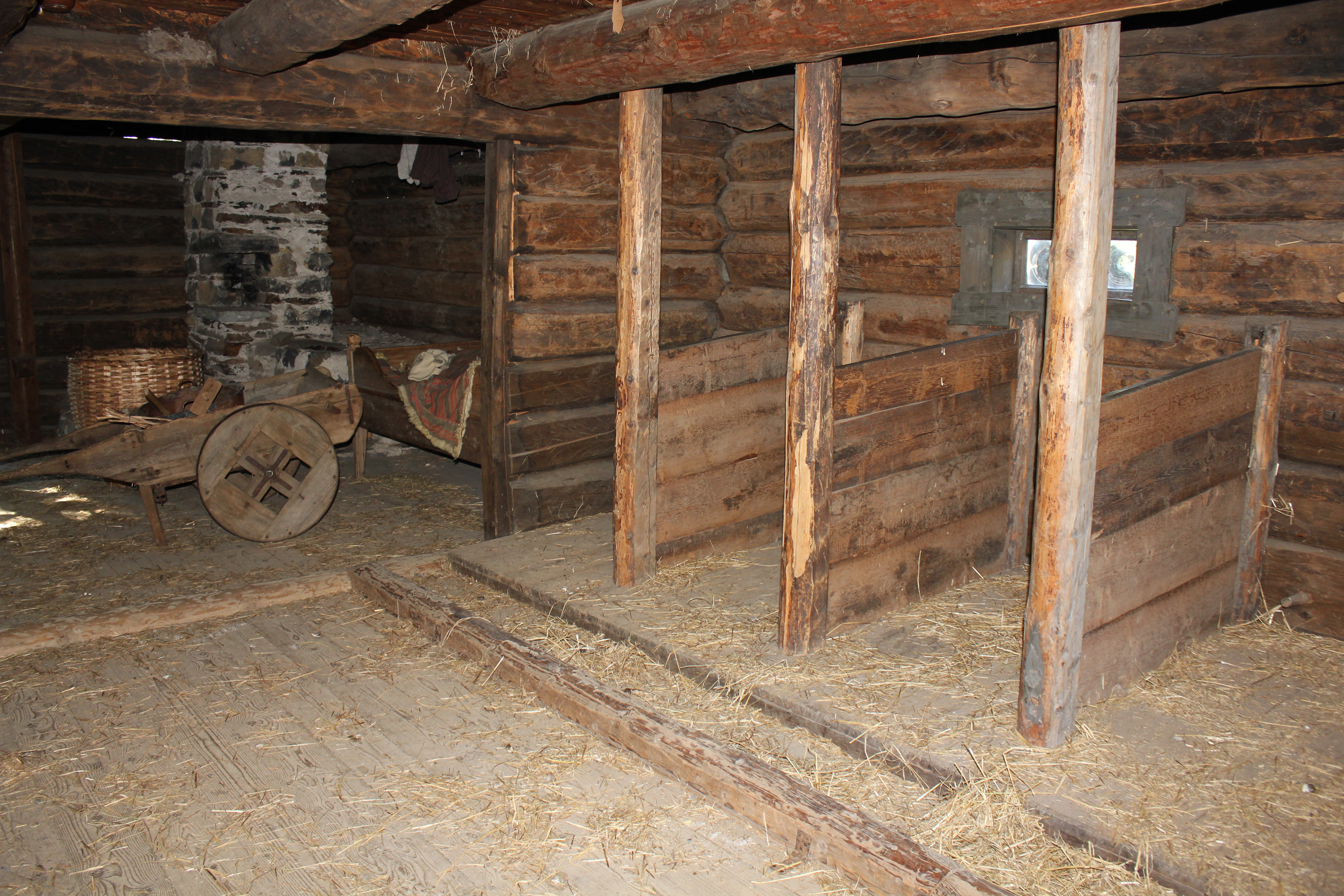 Gammelt fjøs med seng for budeie på Maihaugen.